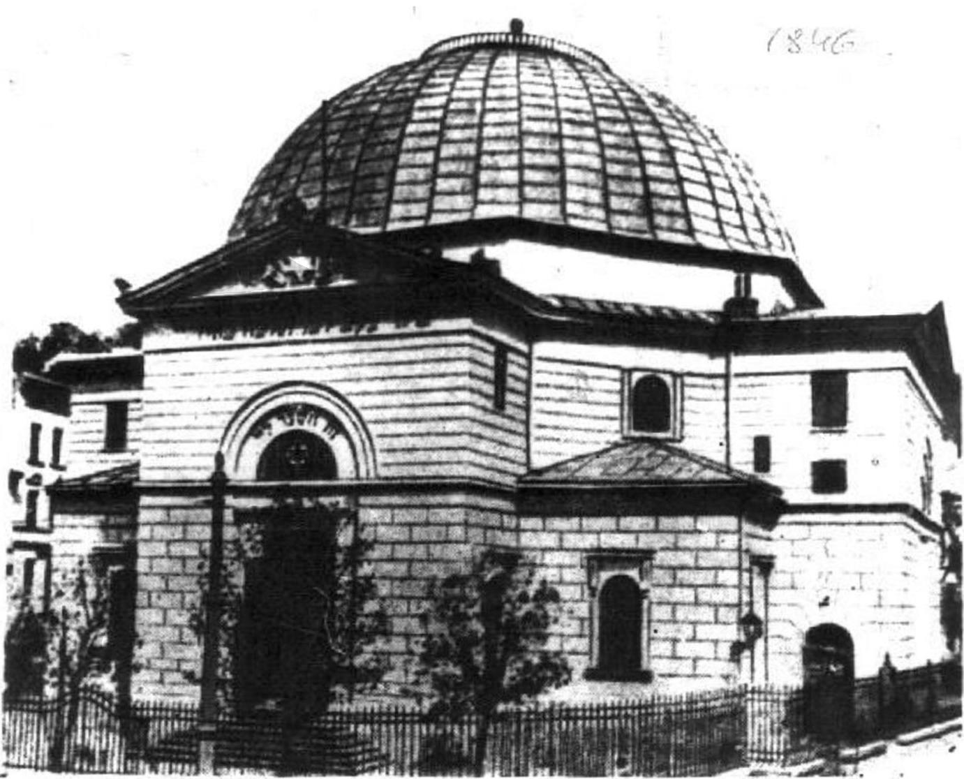 Синагога Темпль у Львові, 1846.